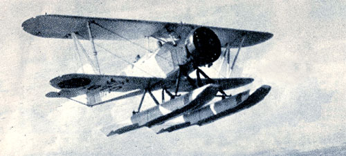 K5Y2 93式中間水上練習機